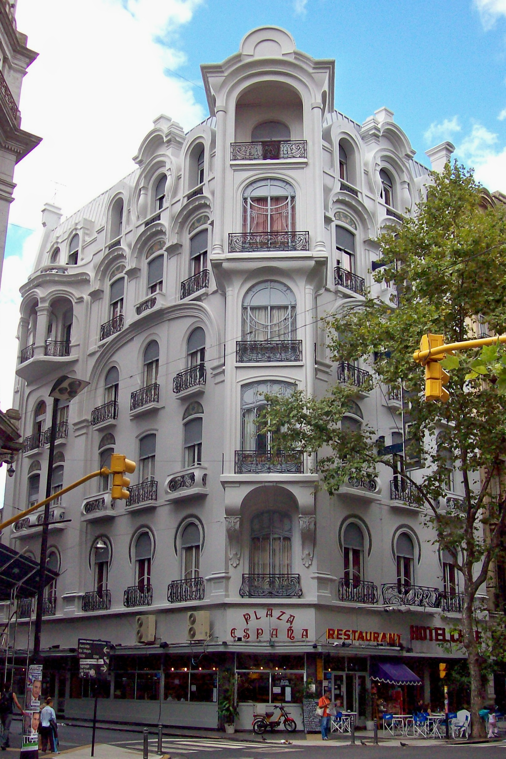 Avenida de Mayo, Buenos Aires: Hotel Chile (art noveau).